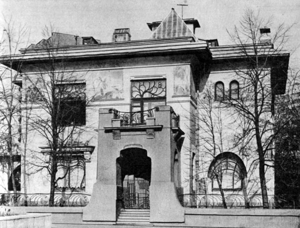 Здание, в котором находился детский дом-лаборатория "Международная солидарность"